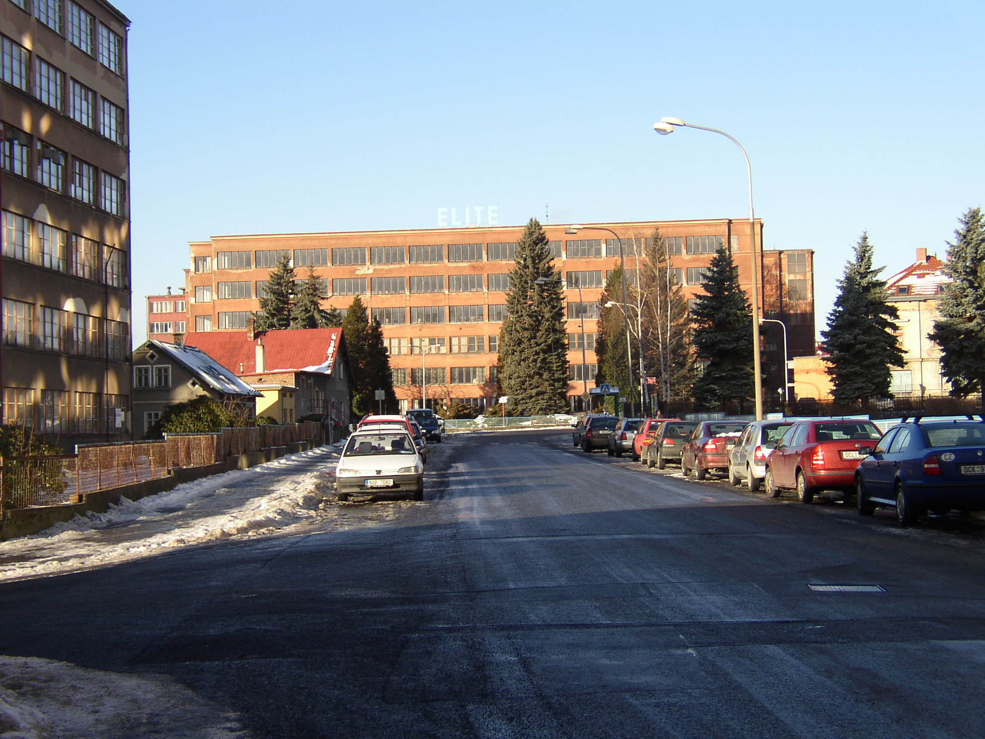 Varnsdorf, závod Elite